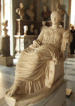 Helena - Kapitolinisches Museum Rom